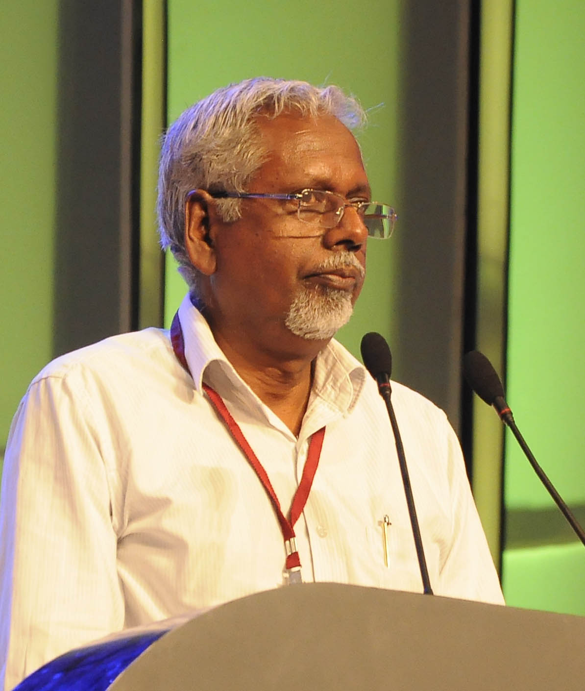 മീഡിയാവൺ ചാനൽ ഉദ്ഘാടന വേദിയിൽ ഒ. അബ്ദുറഹ്മാൻ